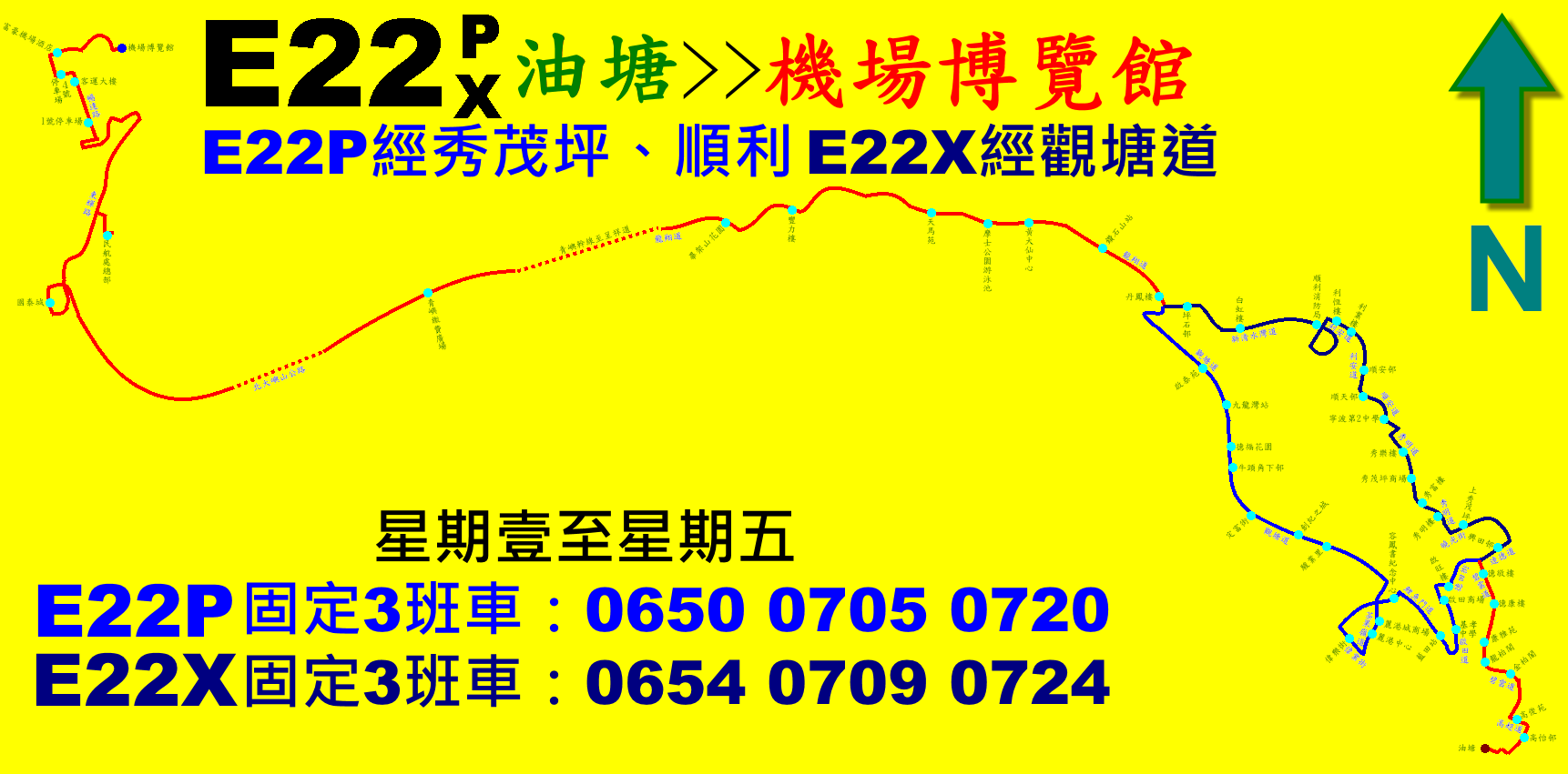 中文（香港）: 城巴E22P線(深藍)及E22X線(藍)往機場方向的走線圖